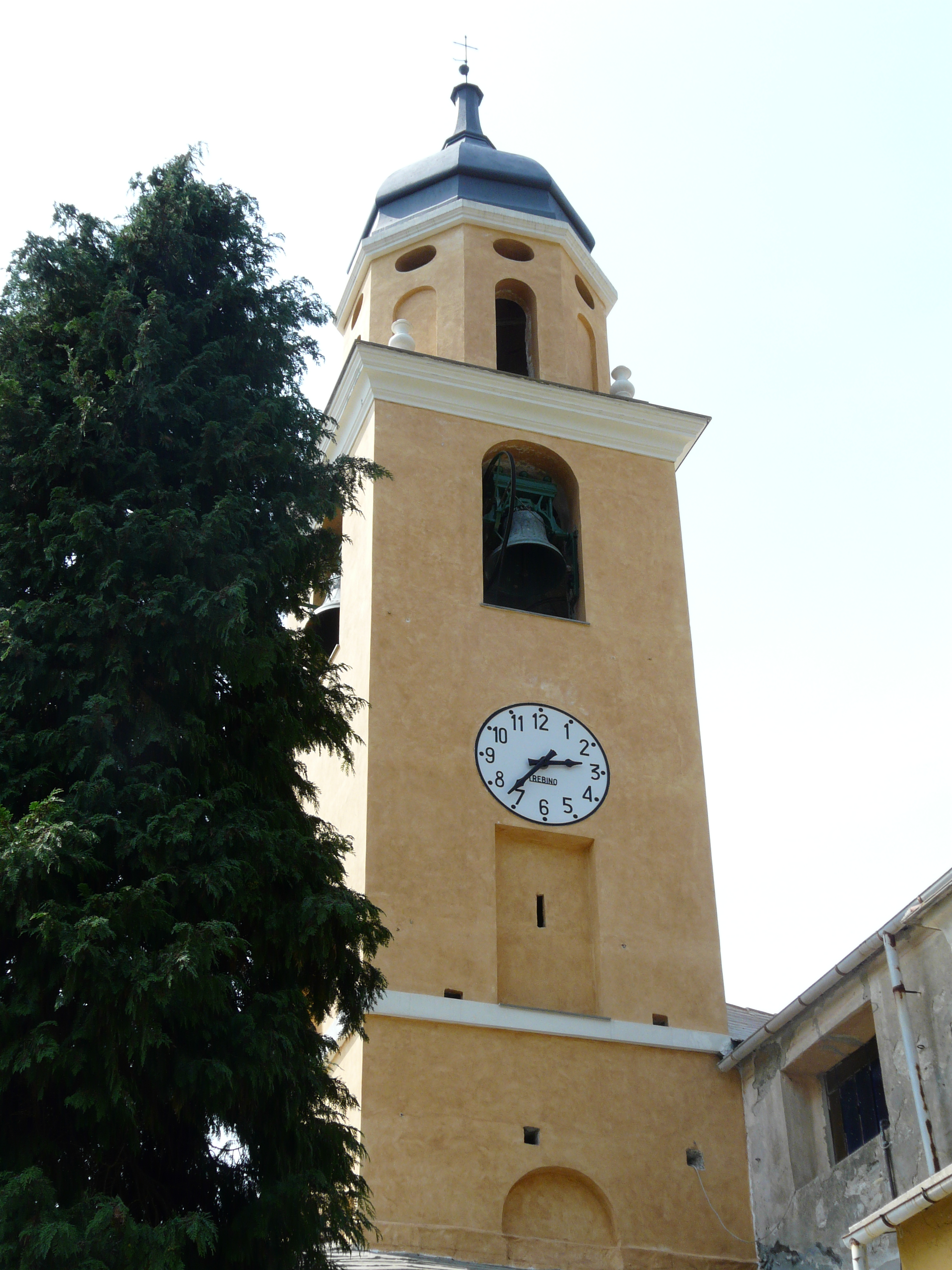 Campanile della chiesa di Santa Margherita, Testana, Avegno, Liguria, Italia